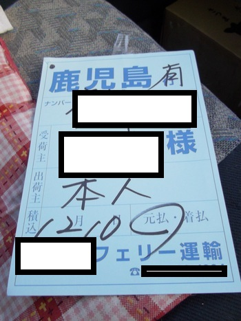 航送、許可証、及び送り状